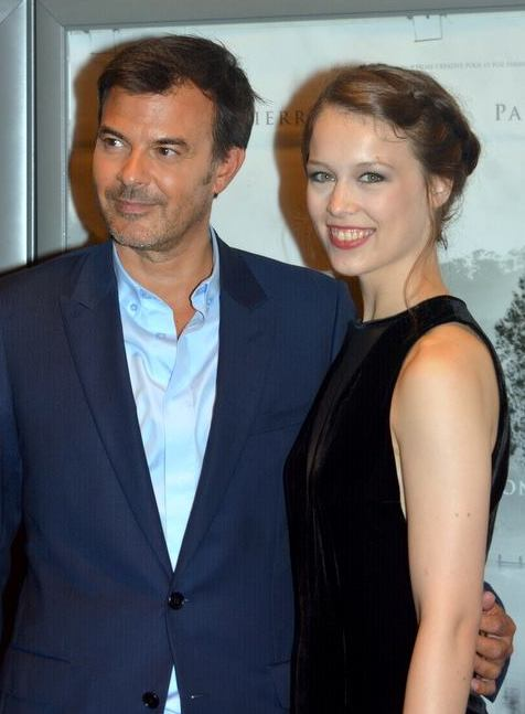 François Ozon et Paula Beer à l'avant-première parisienne de "Frantz"